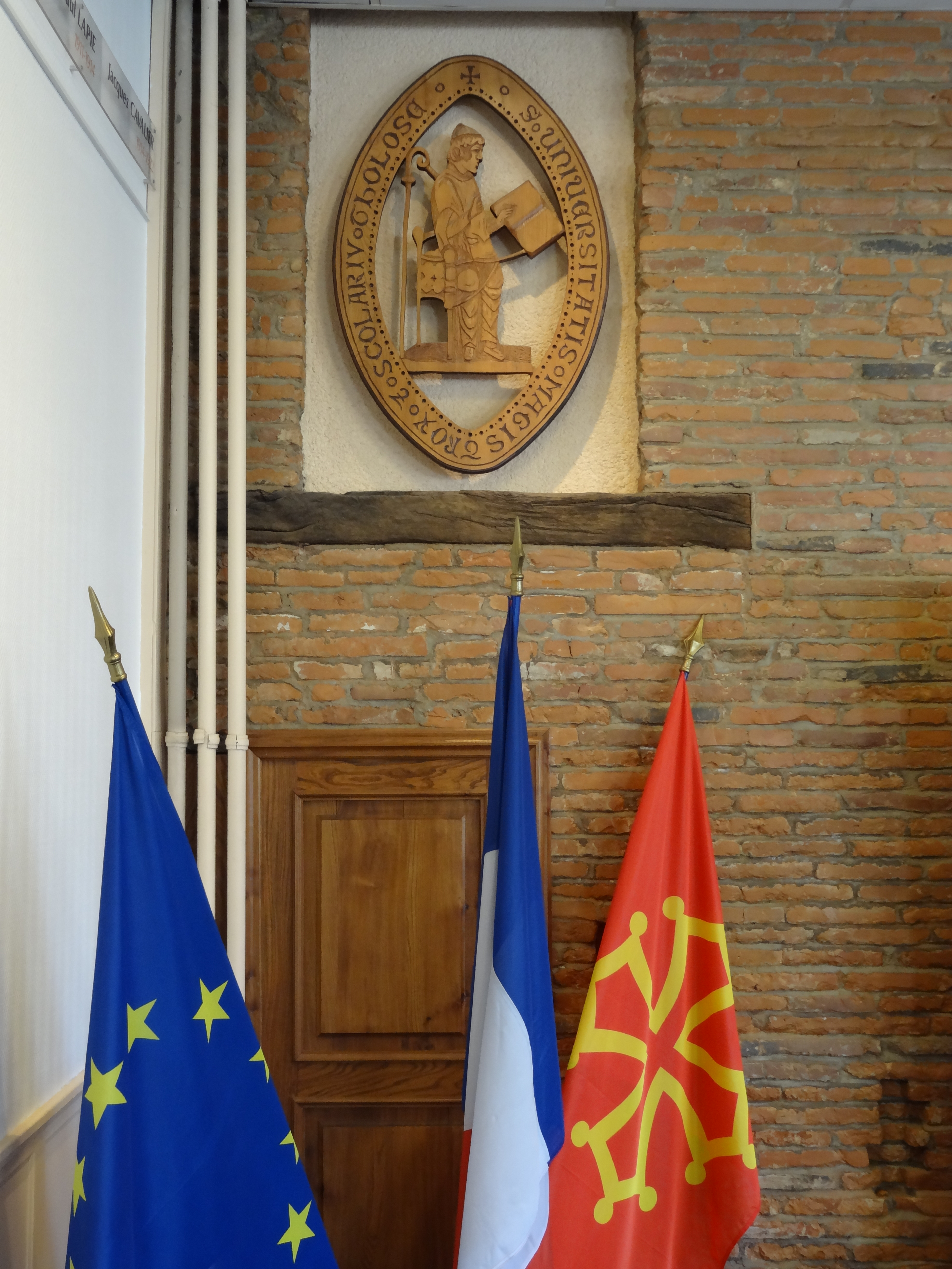 Hôtel de Lestang (actuel Rectorat de Toulouse), Sceau de l'Université de Toulouse .